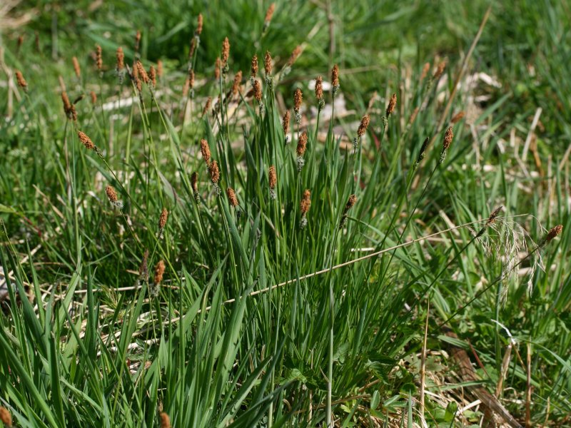 Steife Segge (Carex elata), Habitus